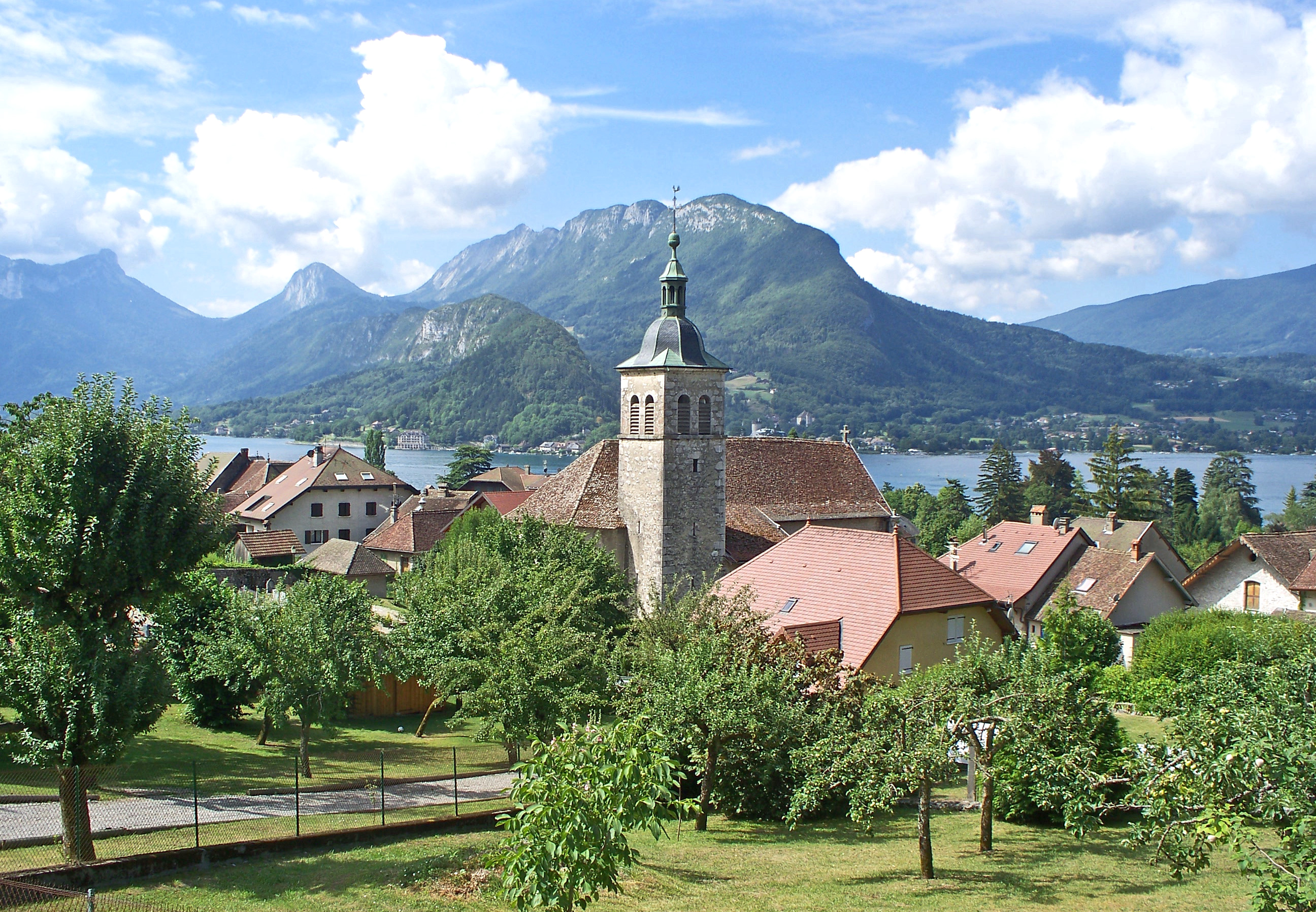 Église Saint-Maurice de Talloires, au bord du lac d'Annecy